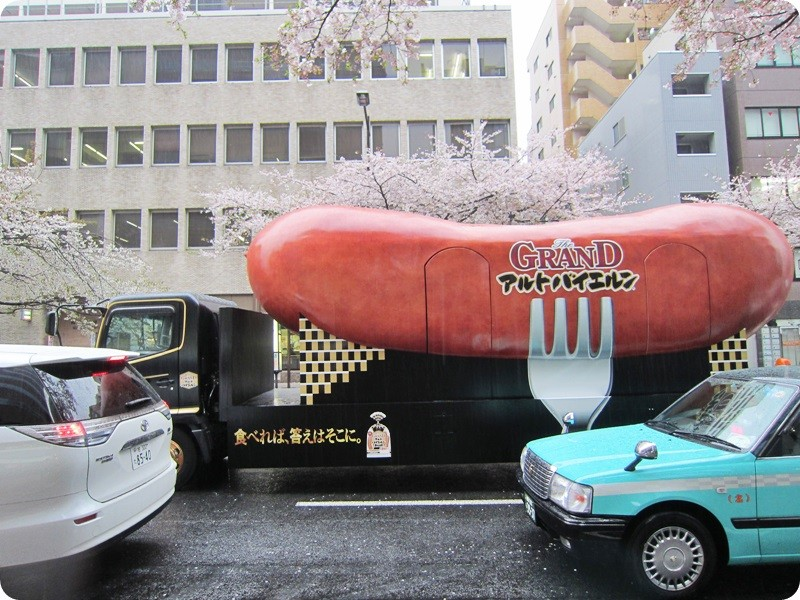 伊藤ハム グランド・ウインナーする～号 (reference [1] [2] [3]) note 食べれば、答えはそこに。